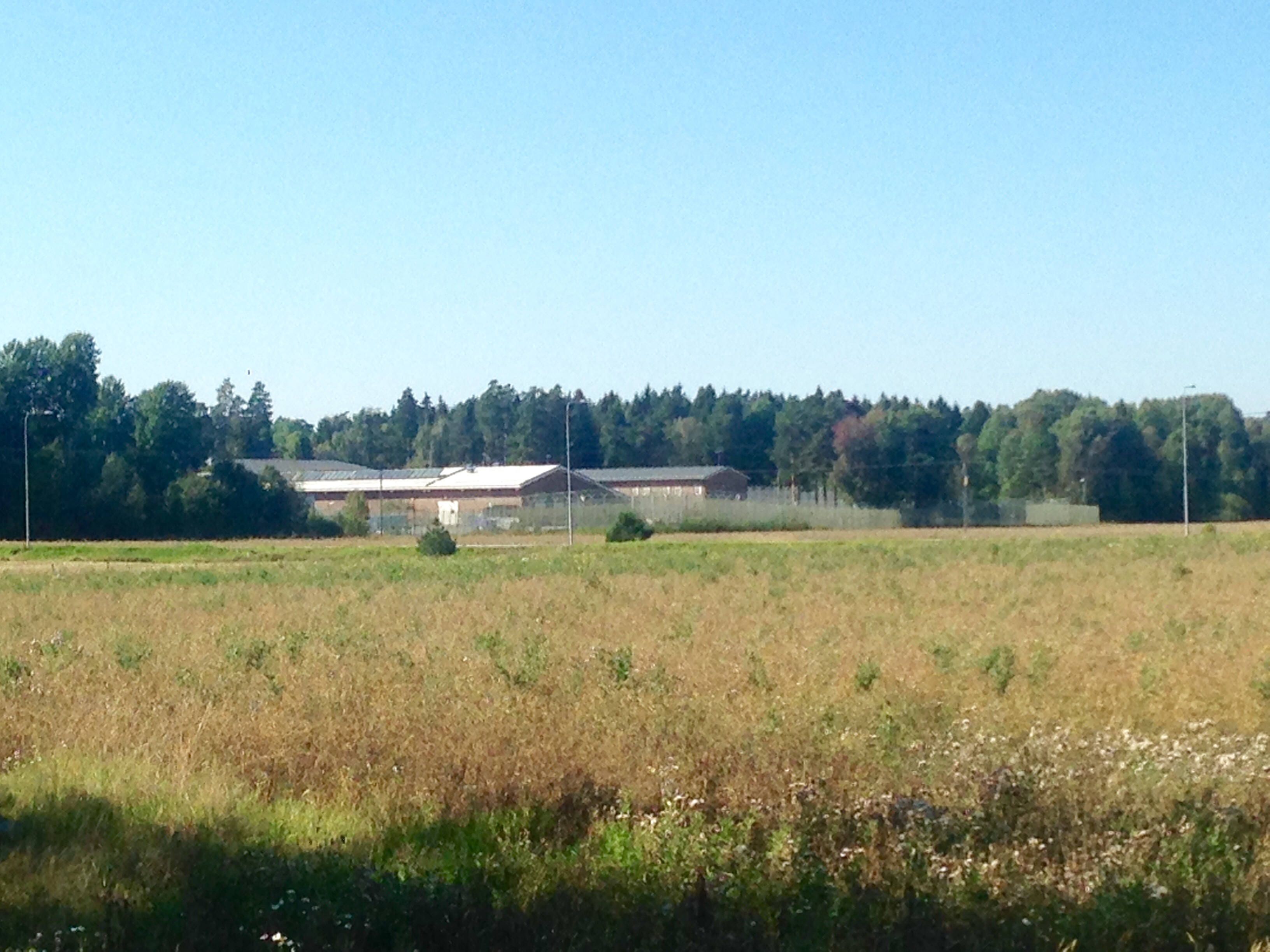 Anstalten Storboda